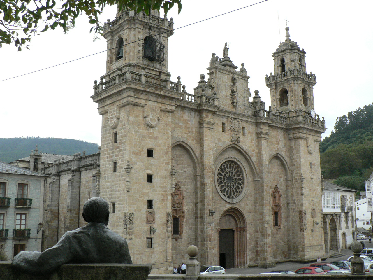 Mondoñedo - La Catedral basílica posee varios estilos, fue construida sobre bases románicas y góticas (siglos XIII y XIV), luego debido a las sucesivas ampliaciones y reformas se decoró con adornos barrocos, se remodeló la fachada y se añadieron las dos torres en el siglo XVIII. La estatua en bronce de Álvaro Cunqueiro en frente de la catedral.